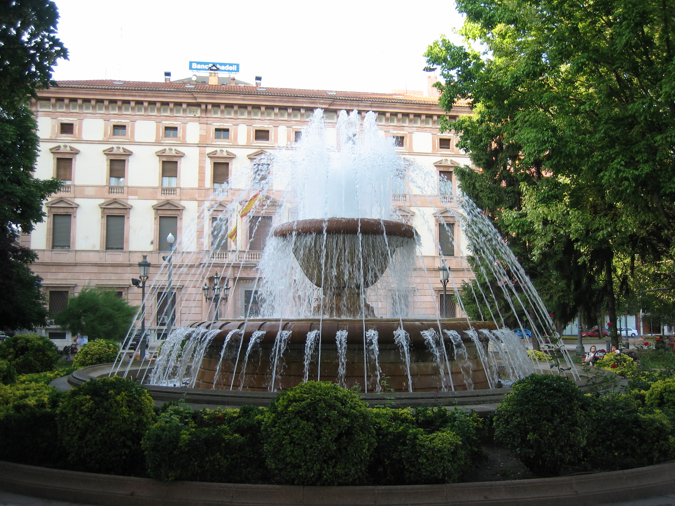 Fuente del Gobierno Civil de Lleida